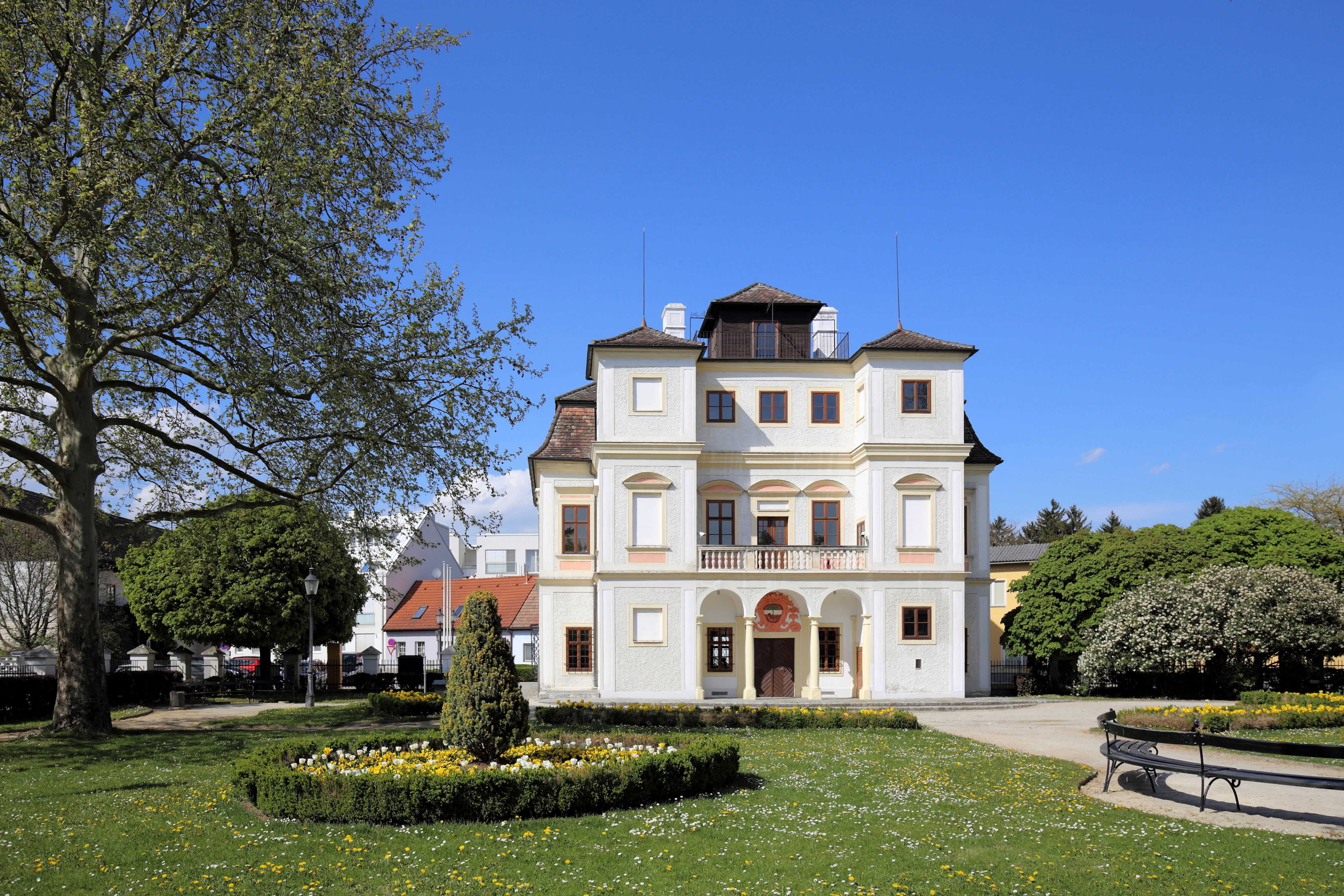 Südansicht des Belvedereschlössl in der niederösterreichischen Stadt Stockerau. Ein um 1672/1701 errichtetes Lustschlößl der ehemaligen Herrschaft Freisegg. Seit Mitte der 1980er Jahre wird das ehemalige Schlössl als Kulturzentrum und Museum genutzt.